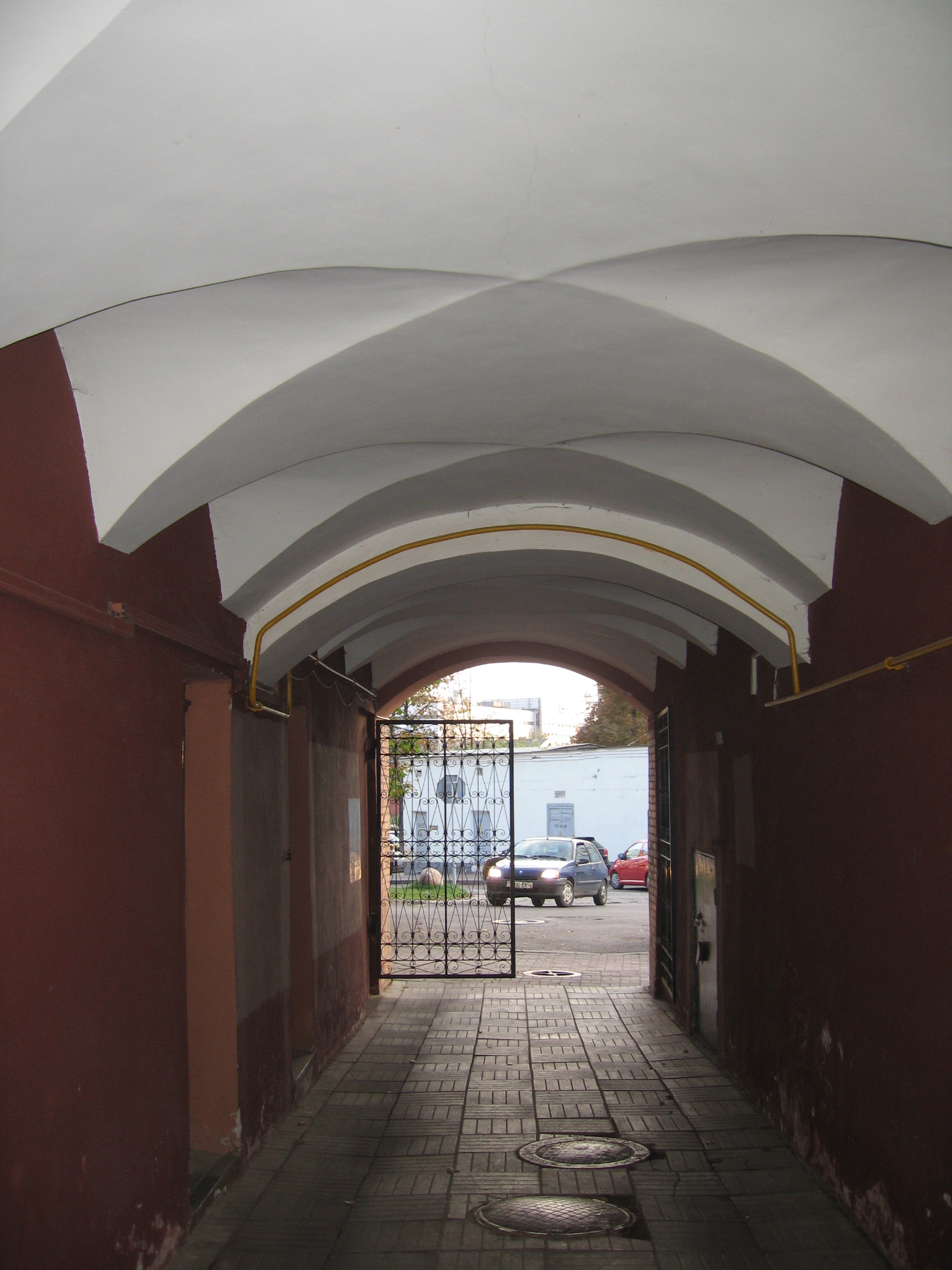 Беларуская (тарашкевіца): Гістарычны цэнтар г. Менску: будынкі і збудаваньні, пляніровачная структура, ляндшафт і культурны пласт. г. Менск This is a photo of Belarusian heritage monument. Reference number: 711Е000001 ( WLM)